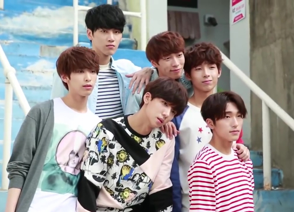 (SNUPER(스누퍼)) 프로필 촬영 비디오